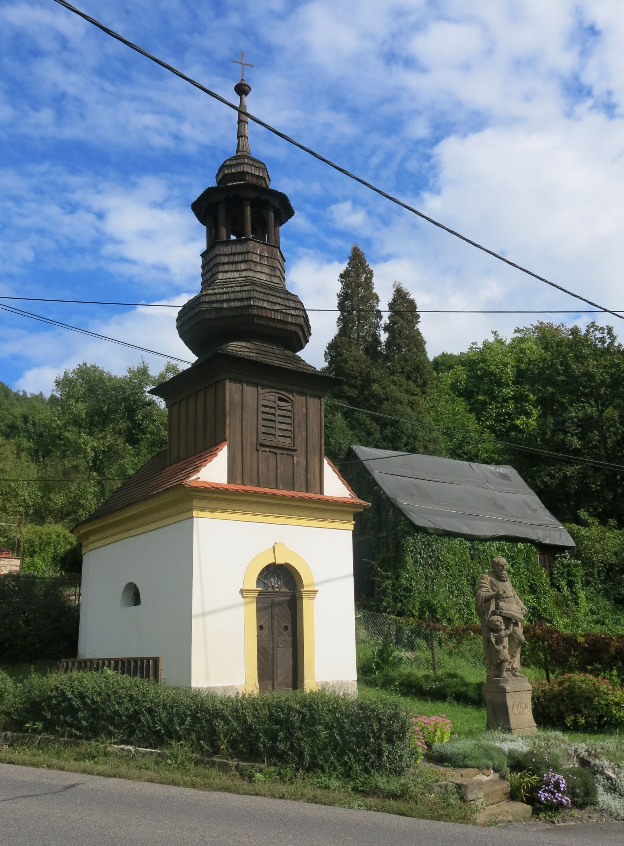 Kaple, Českolipská, st. 6, Březiny (Děčín).